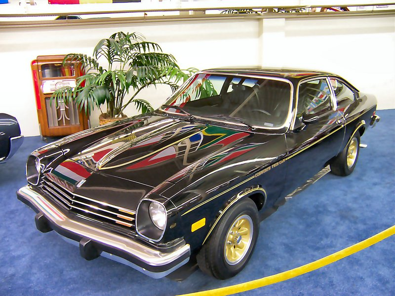 Foto sotto GNU License (presa dalla Wikipedia inglese)